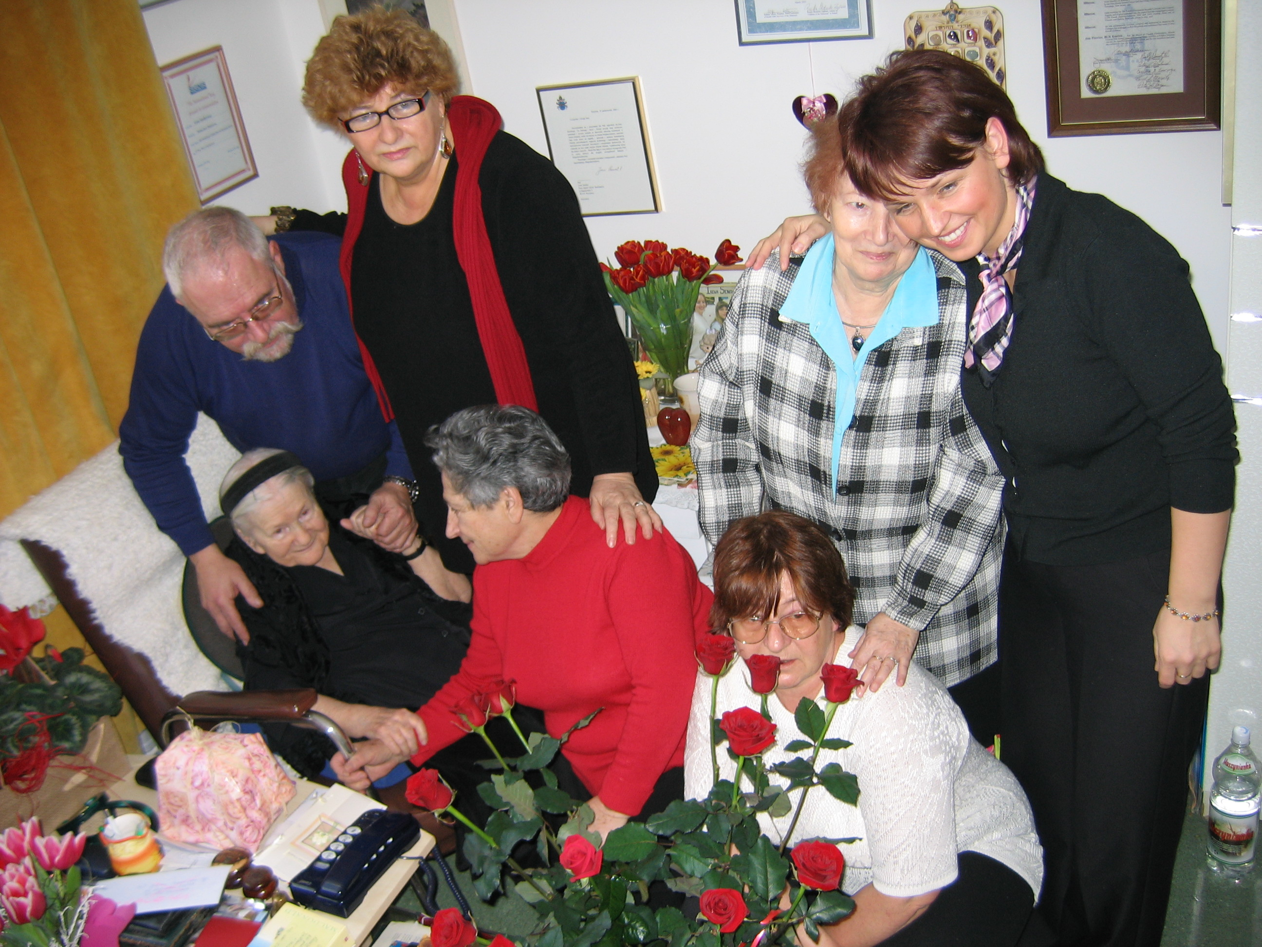 Irena Sendlerowa wśród członków Stowarzyszenia Dzieci Holokaustu (od lewej:Julian Pyz, Elżbieta Ficowska, Krystyna Budnicka, córka Janina Zgrzembska, Joanna Sobolewska i Małgorzata Indraszyk)/Irena Sendler (1910-2008), Polish social worker and activist, Righteous Among the Nations